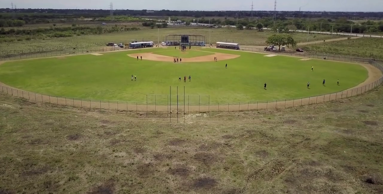 Campo de entrenamiento José Canó.